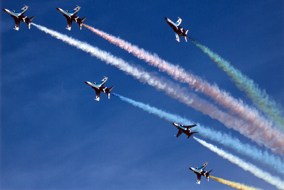 航空自衛隊 ブルーインパルス T-2 チェンジオーバー・ターン